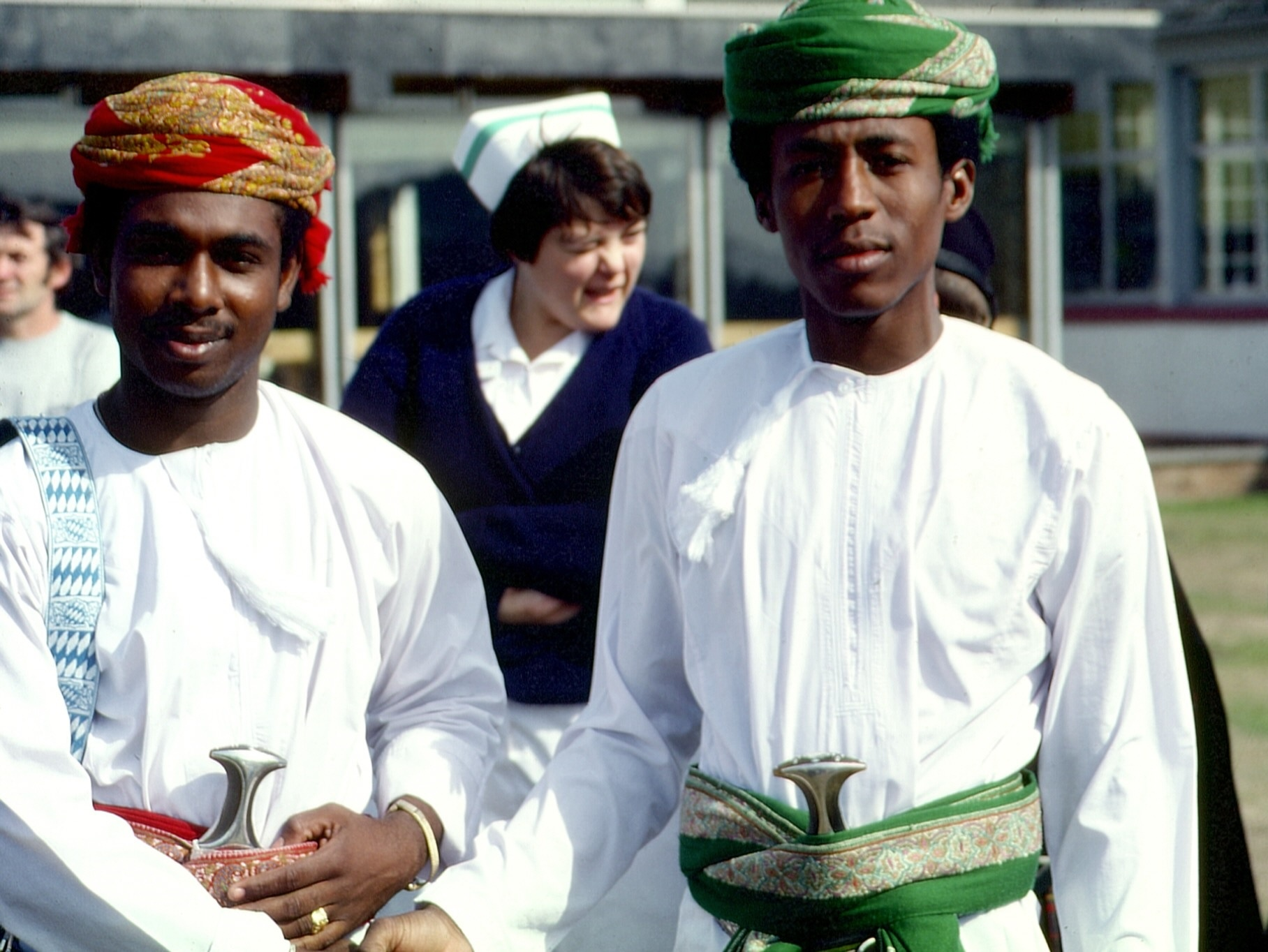 Omanische Offiziere vor dem Princess Margaret Rose Orthopaedic Hospital in Edinburgh